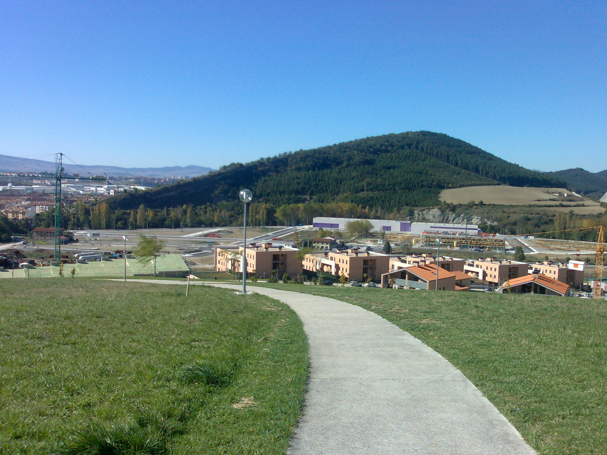 Esteribargo Olloki kontzejua.